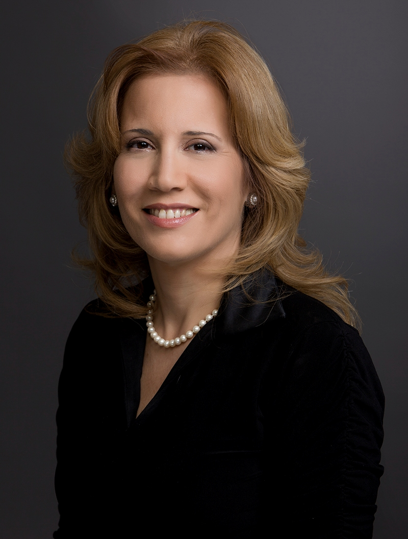 עליזה לביא חברת הכנסת ה-19 מטעם מפלגת יש עתיד